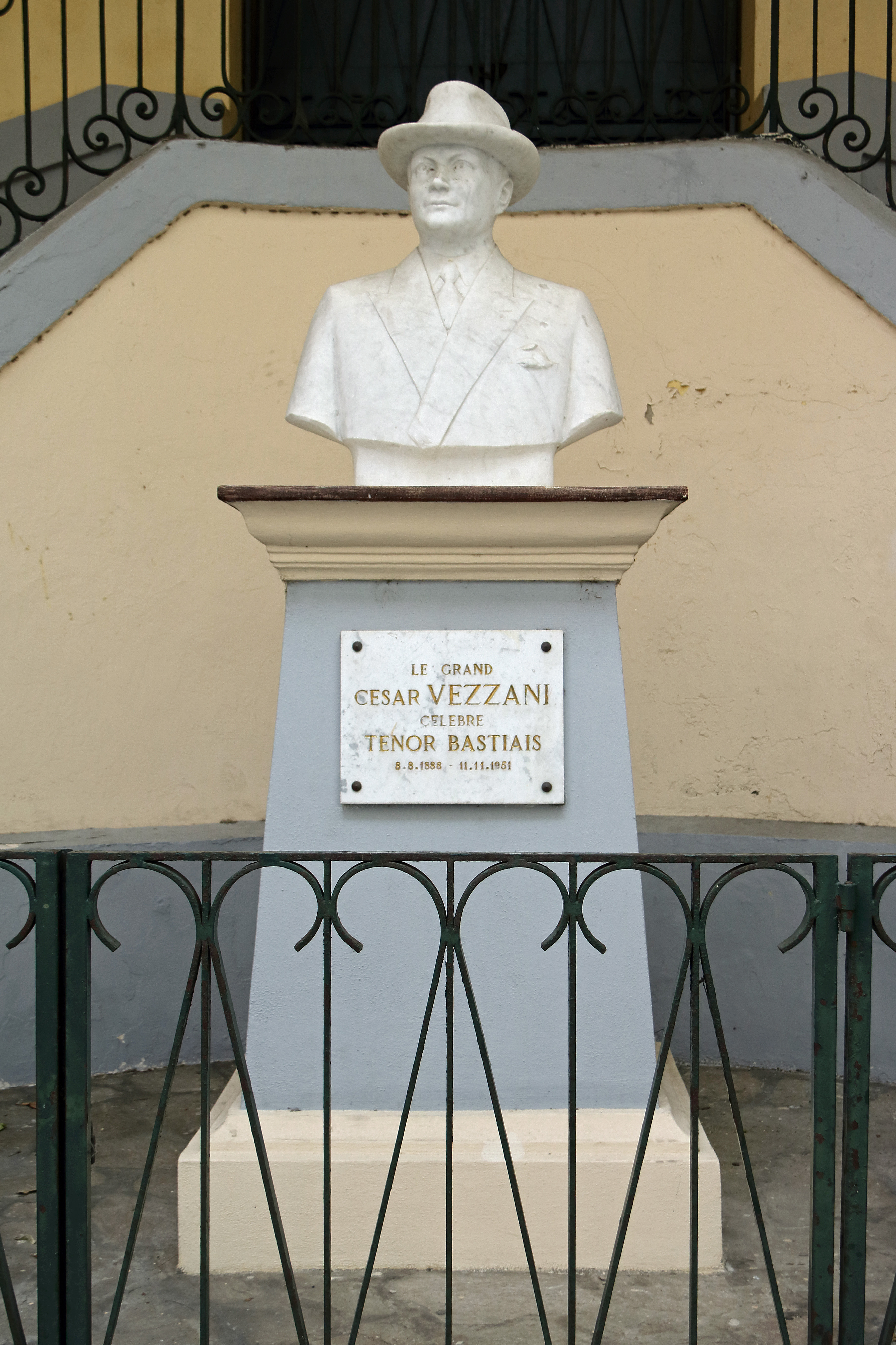 BASTIA - Buste de César Vezzani - Ecole Nationale de Musique, rue César Campinchi